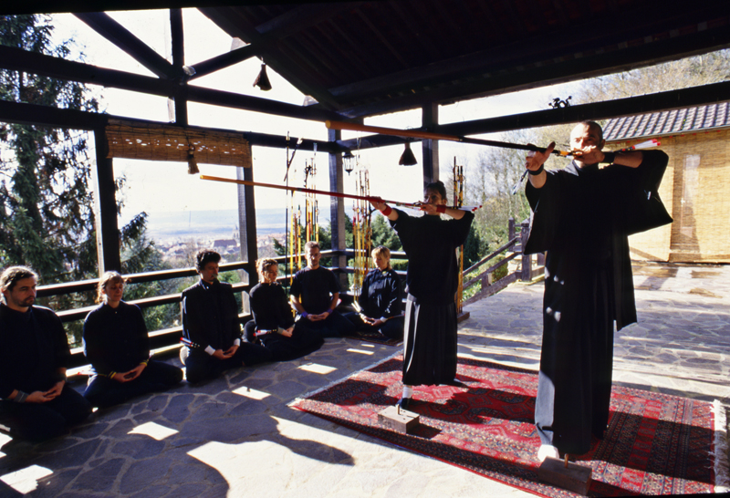 Zen Dojo Sarbacana 1998